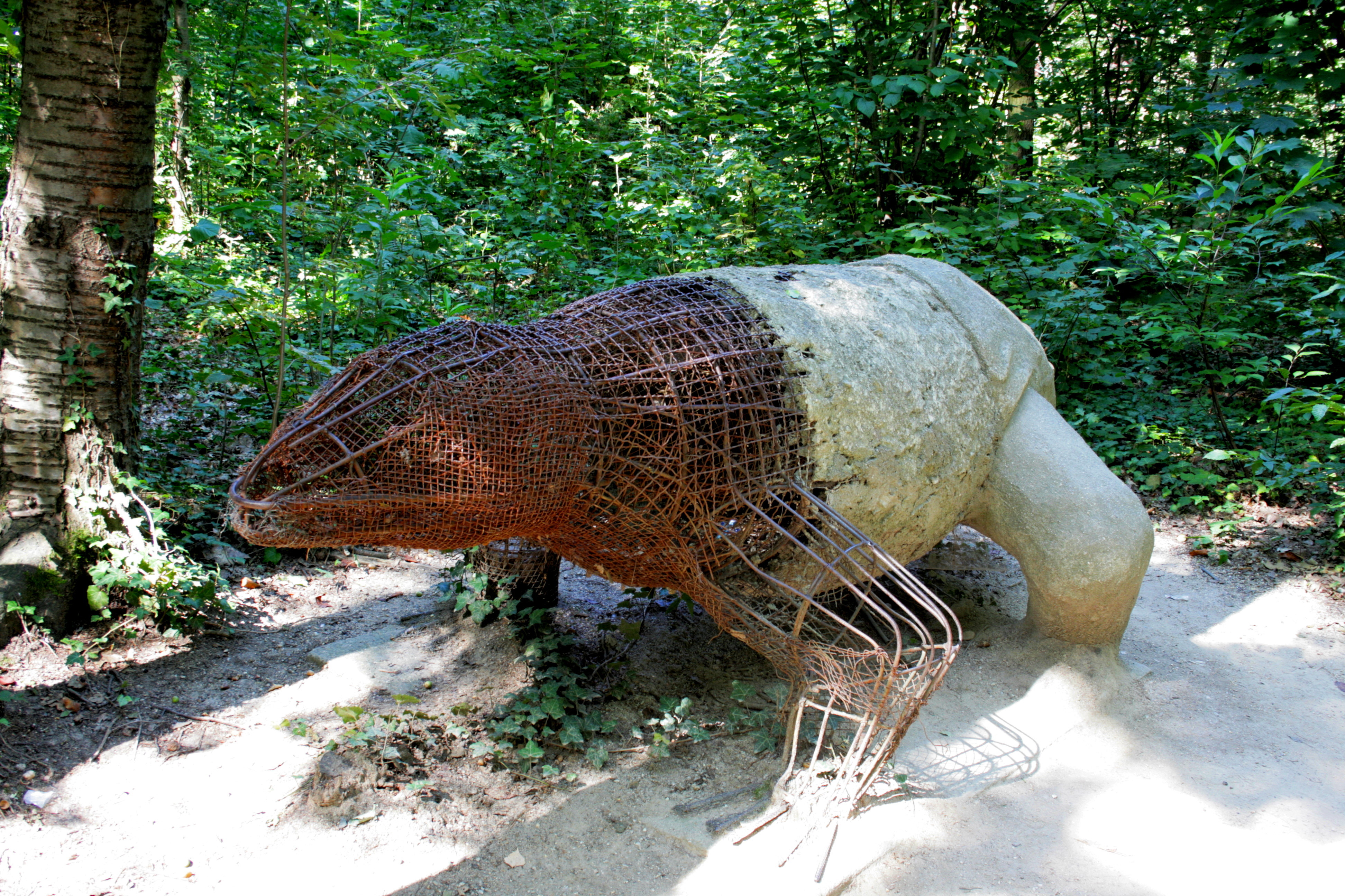 Saurierpark in Bautzen-Kleinwelka